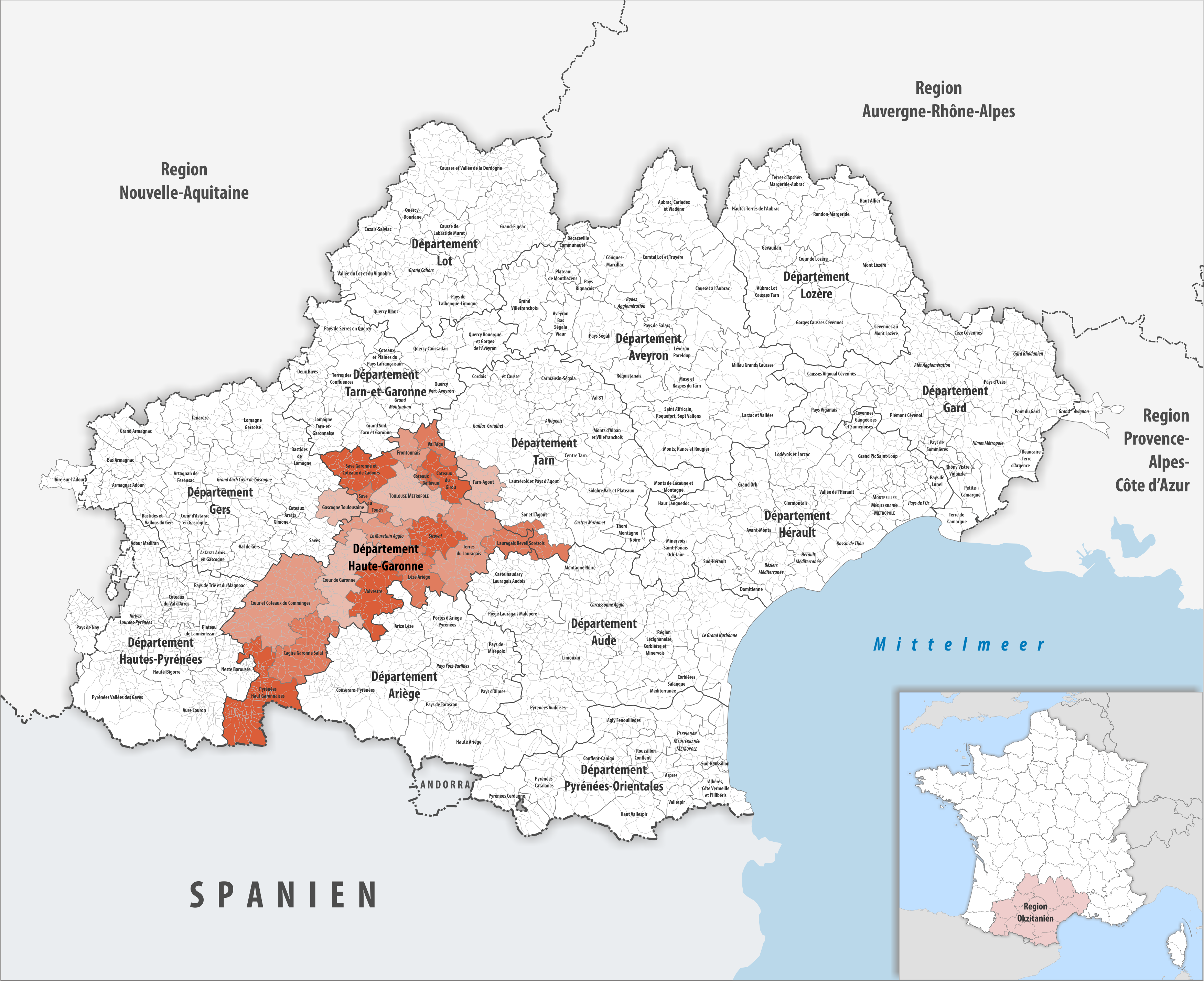 Gemeindeverbände im Département Haute-Garonne